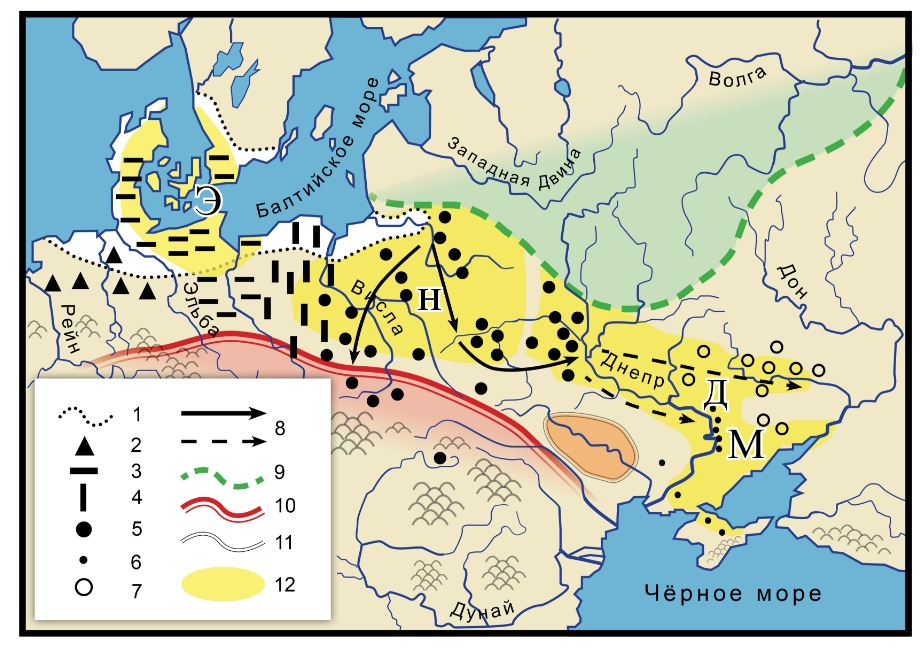 Индоевропейцы, ямная культура. Условные обозначения: 1 - область культур круга маглемозе в VII тыс. до н. э. (по Г. Кларку). 2 - 7 мезолитические культуры VI тыс. до н. э. культурной традиции постмаглемозе (по С. Козловскому, Л. Зализняку): 2 – де Лейен-Вартена 3 - Ольдеслое - Гудено 4 - Хойнице-Пеньки 5 - Яниславице 6 - находки яниславицких орудий за границами основного ареала 7 - донецкая культура 8 - направления расселения носителей яниславицкой культуры (по С. Козловскому и Л. Зализняку) 9 - южная граница мезолитических и ранненеолитических культур постсвидерской и постаренсбургской традиций 10 - северная граница расселения балкано-дунайских земледельцев (конец VI - нач. V тыс. до н. э. ). 11 - буго-днестровская культура 12 - неолитические культуры, которые сформировались на постмаглемозской этнокультурной подоснове: Е – Эртебёлле-Эллербек Н - неманская Д - днепро-донецкая М- мариупольская (западные варианты).